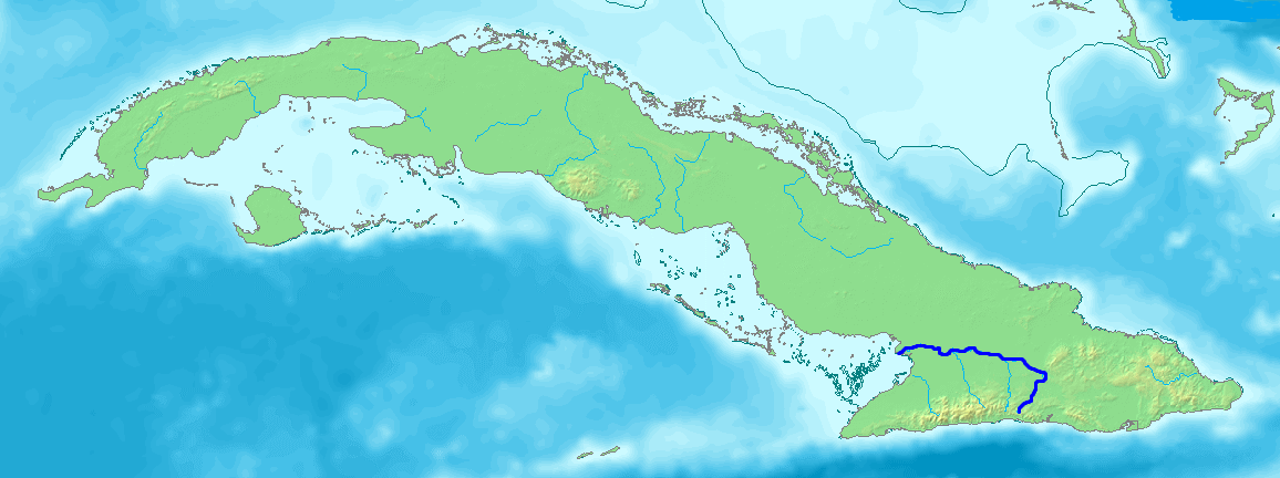 תוואי נהר קאוטו. מקור File:La2-demis-cuba.png